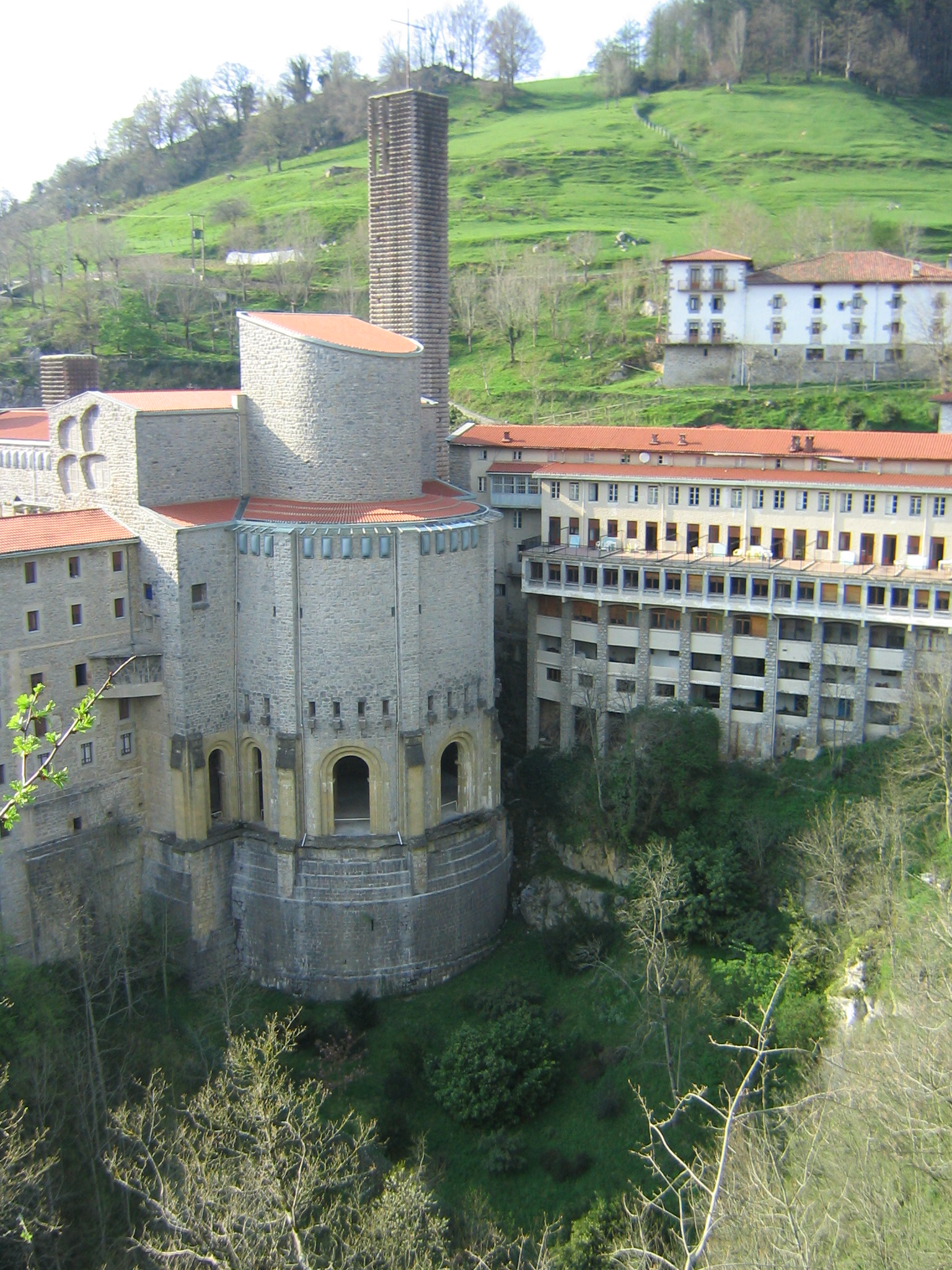 Irudia/Image: Arantzazu santutegia, Oñati, Gipuzkoa